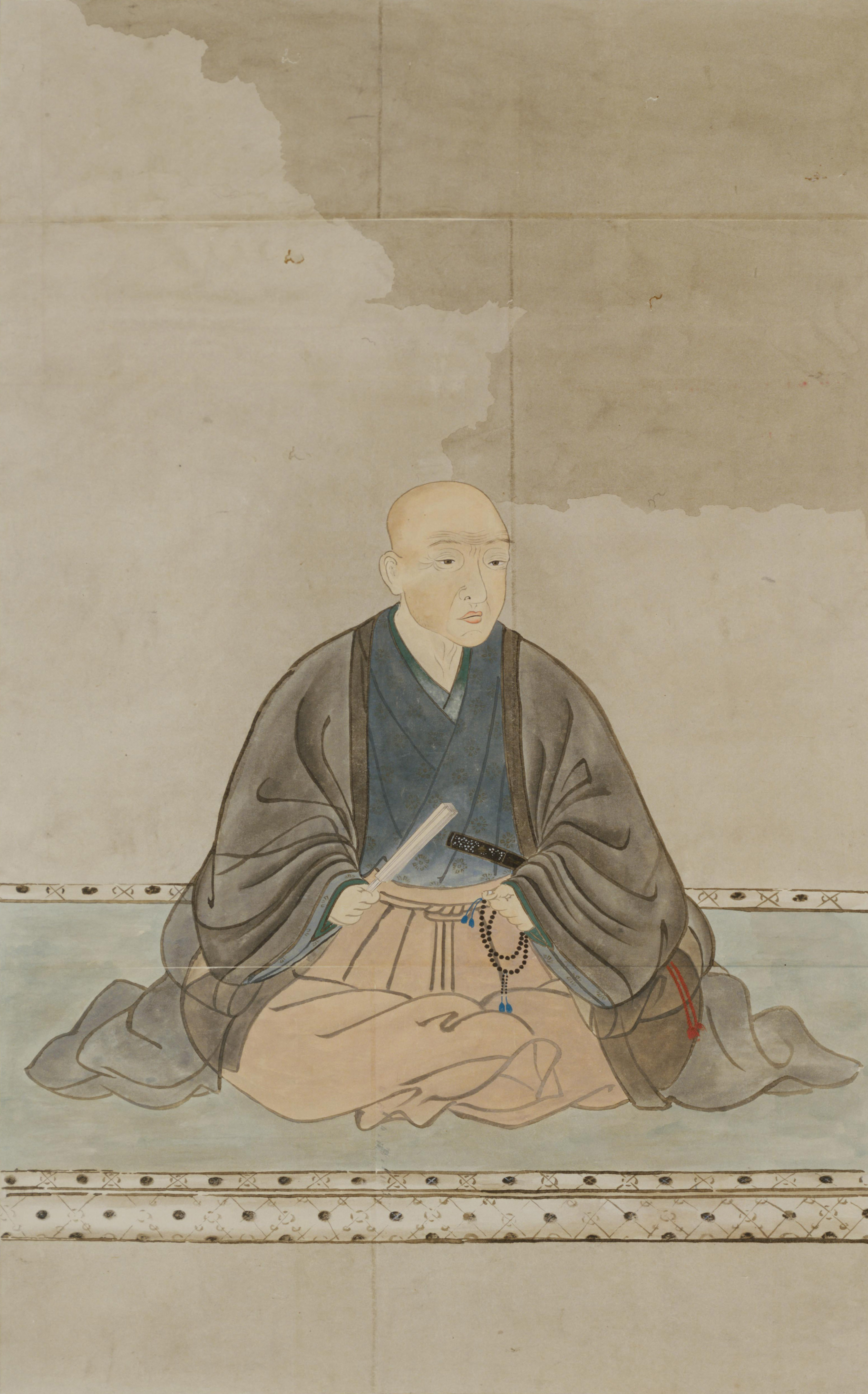 村井貞勝の肖像。